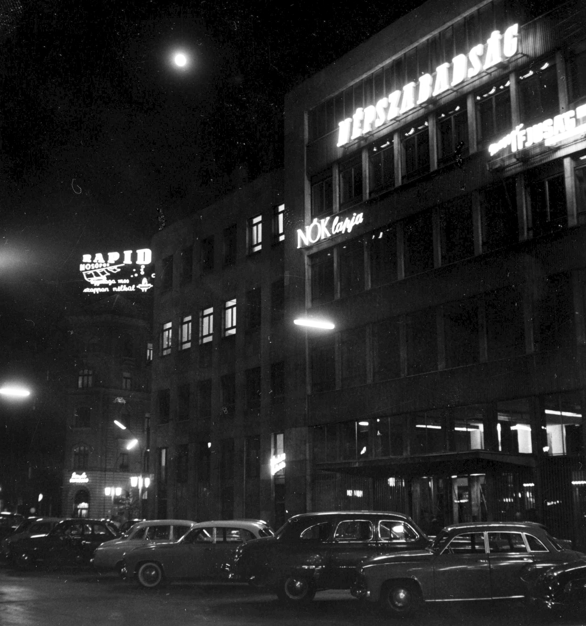 Budapest, VIII. Blaha Lujza tér, Sajtóház Location: Hungary Tags: Budapest Title: Budapest, VIII. Blaha Lujza tér, Sajtóház